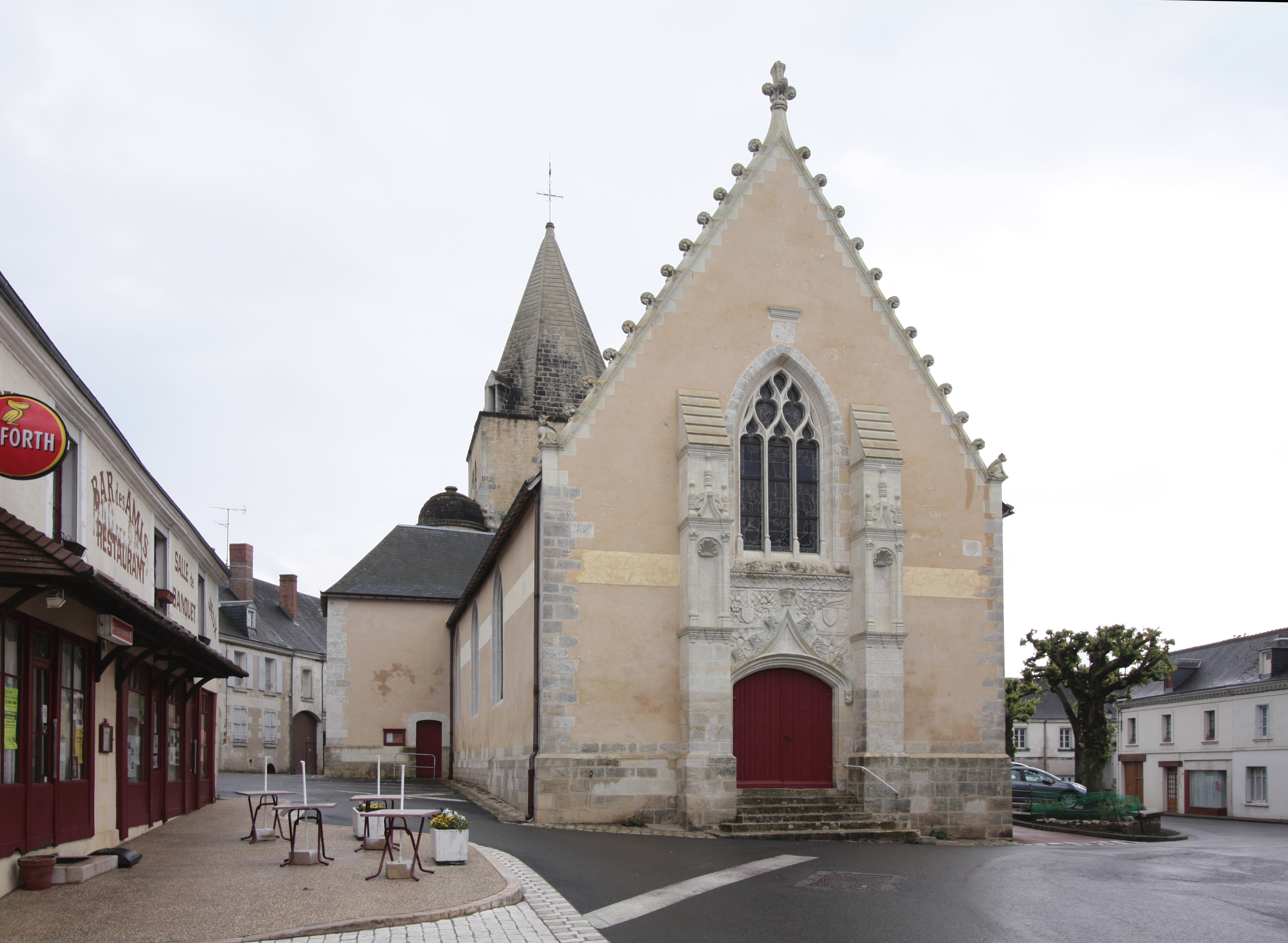 Genillé im Département Indre-et-Loire/Frankreich - Kirche Sainte-Eulalie